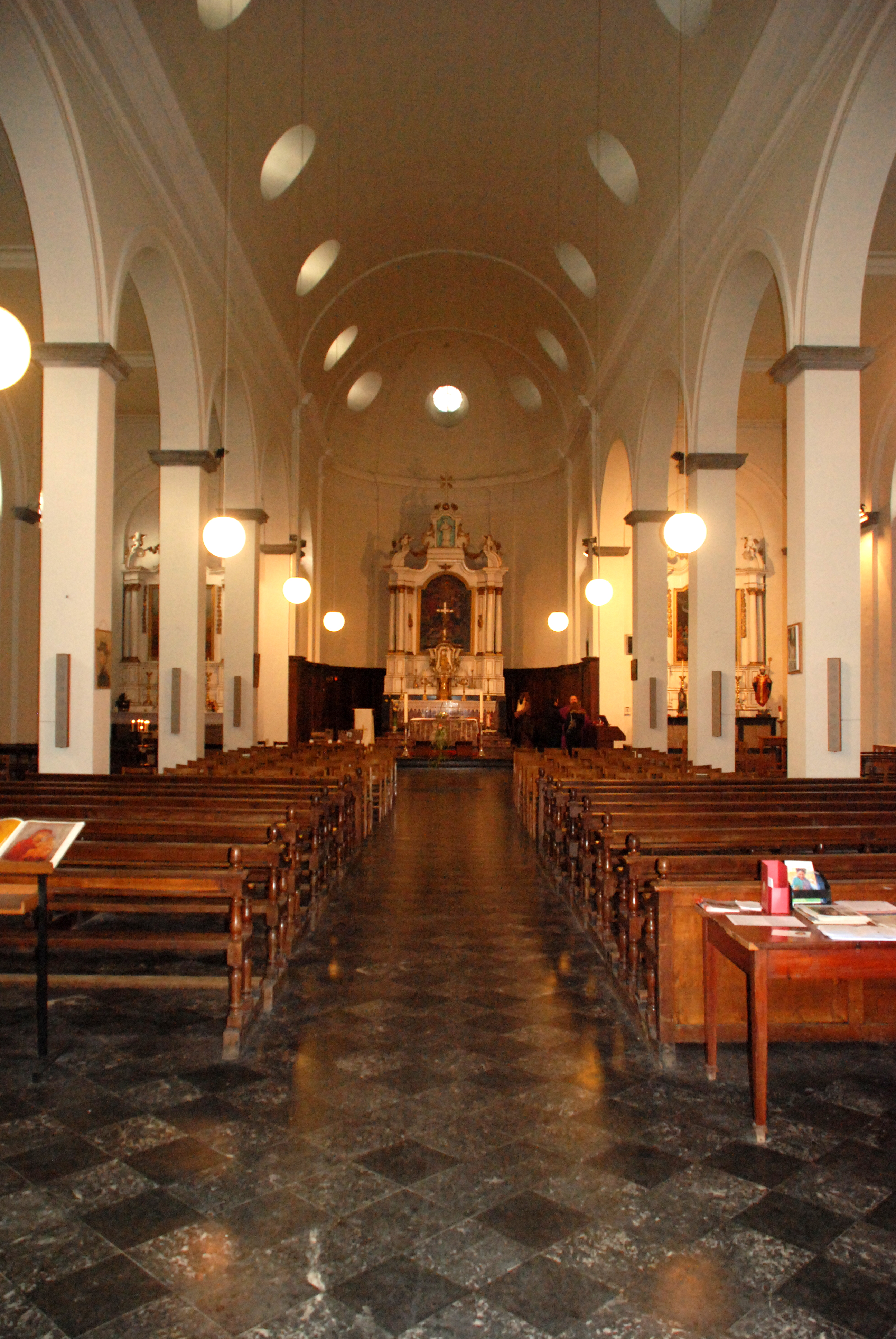 Belgique - Province de Namur - Viroinval - Nismes - église Saint-Lambert (1829)